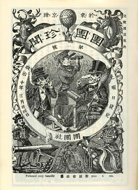 團團珍聞は1877年に創刊された風刺週刊誌。その創刊号の表紙。